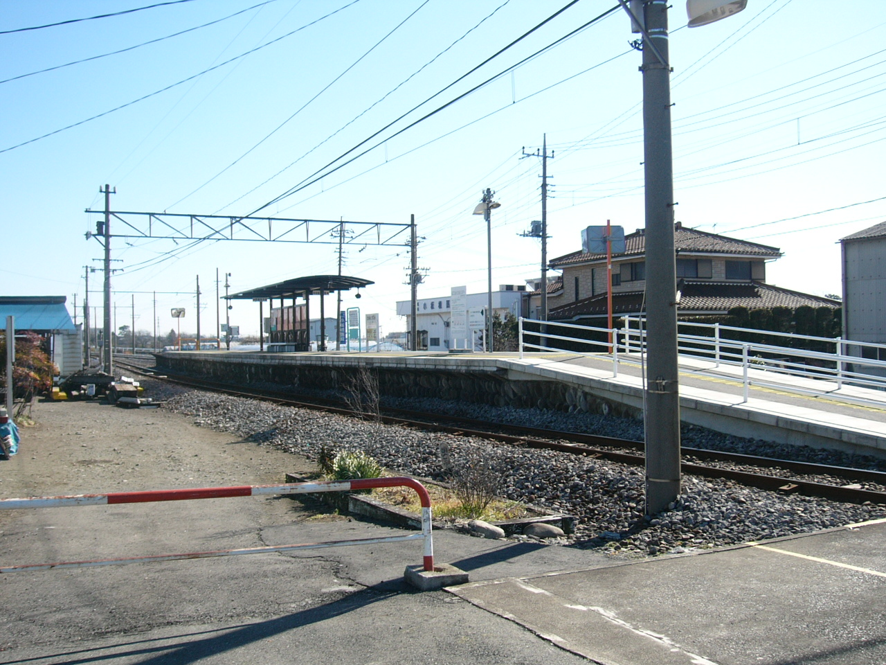 Kamiizumi Station